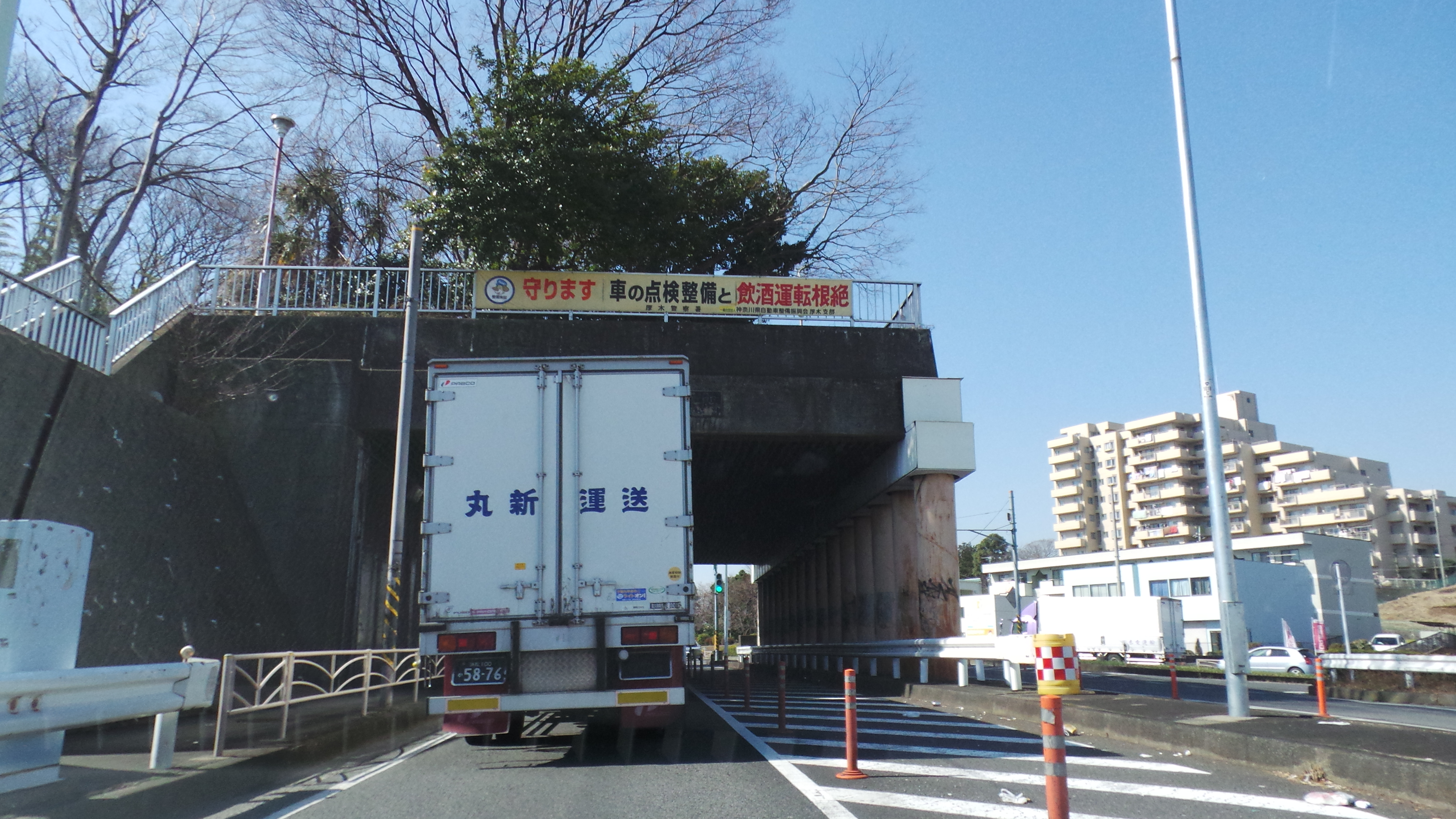 Funako, Atsugi, Kanagawa Prefecture 243-0034, Japan